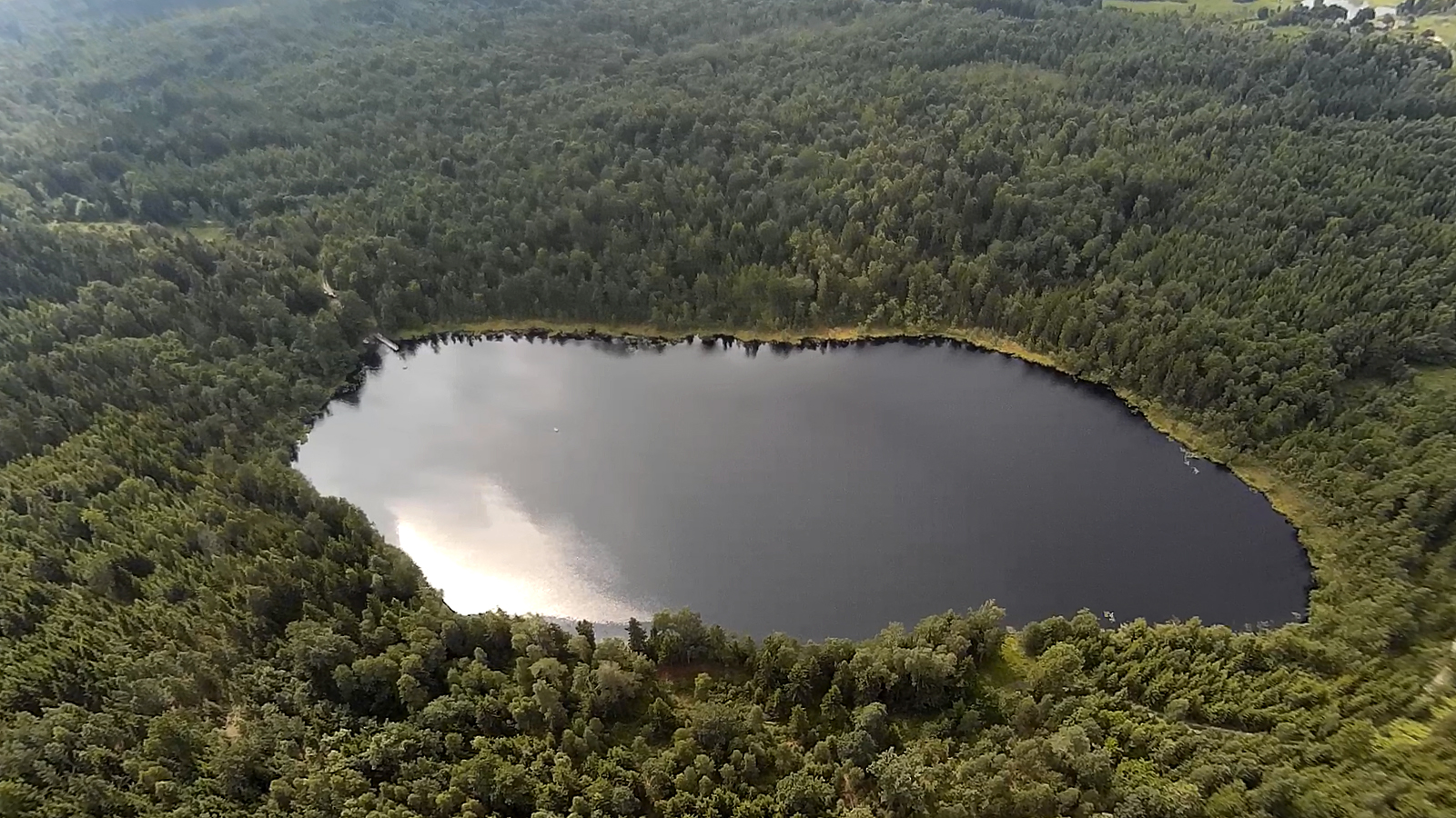 Vaizdas iš viršaus